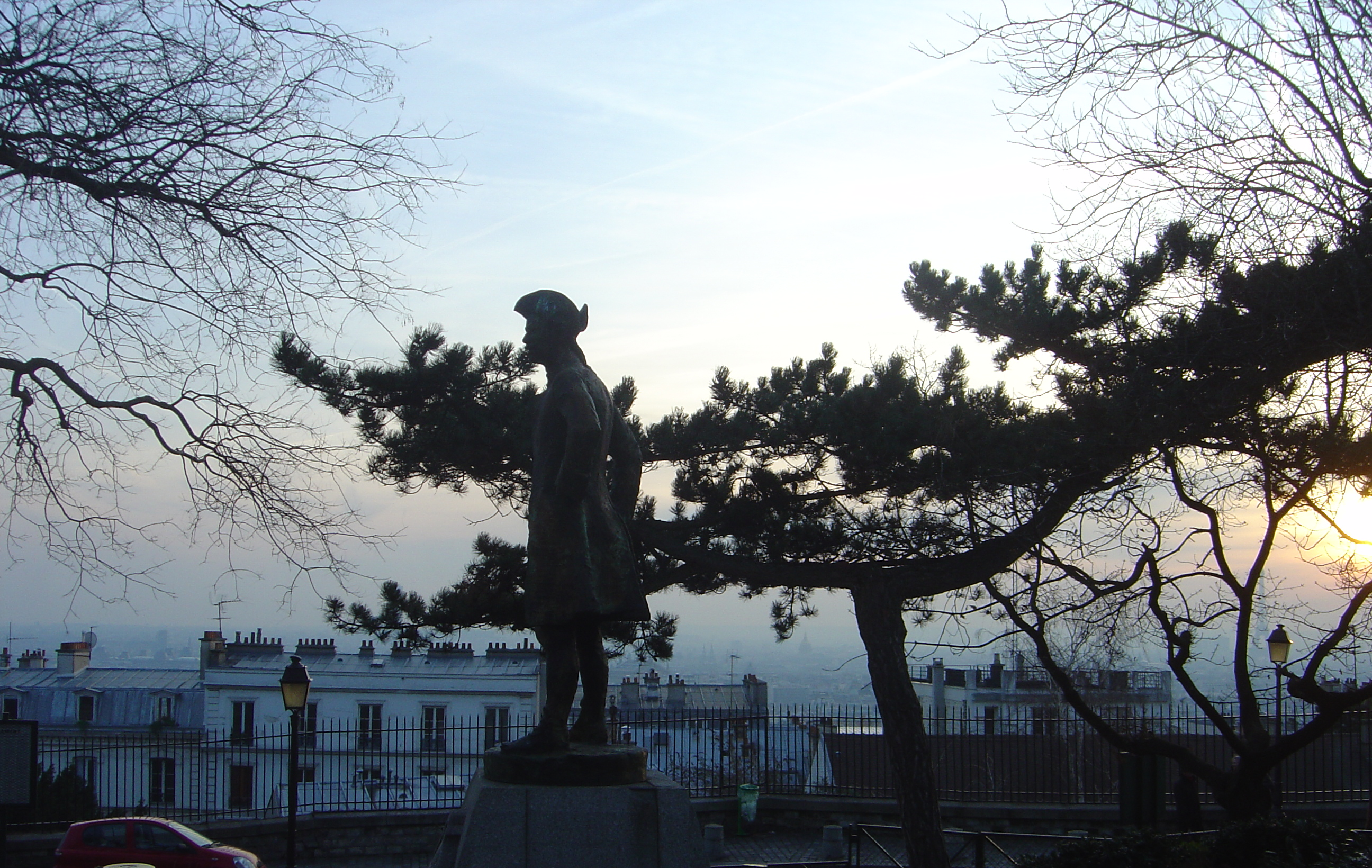 Emmanuel Ball: Le chevalier de la Barre, statue en pied, érigée en 2001, XVIIIe arrondissement, Montmartre, Paris, France. Inscription sur le socle: "La tolerance universelle est la plus grande des lois". Cette oeuvre remplace une statue précédente, élevée en 1905, envoyée à la fonte conformement à la loi du 11 octobre 1941 promulguée par le gouvernement de Vichy. [1]